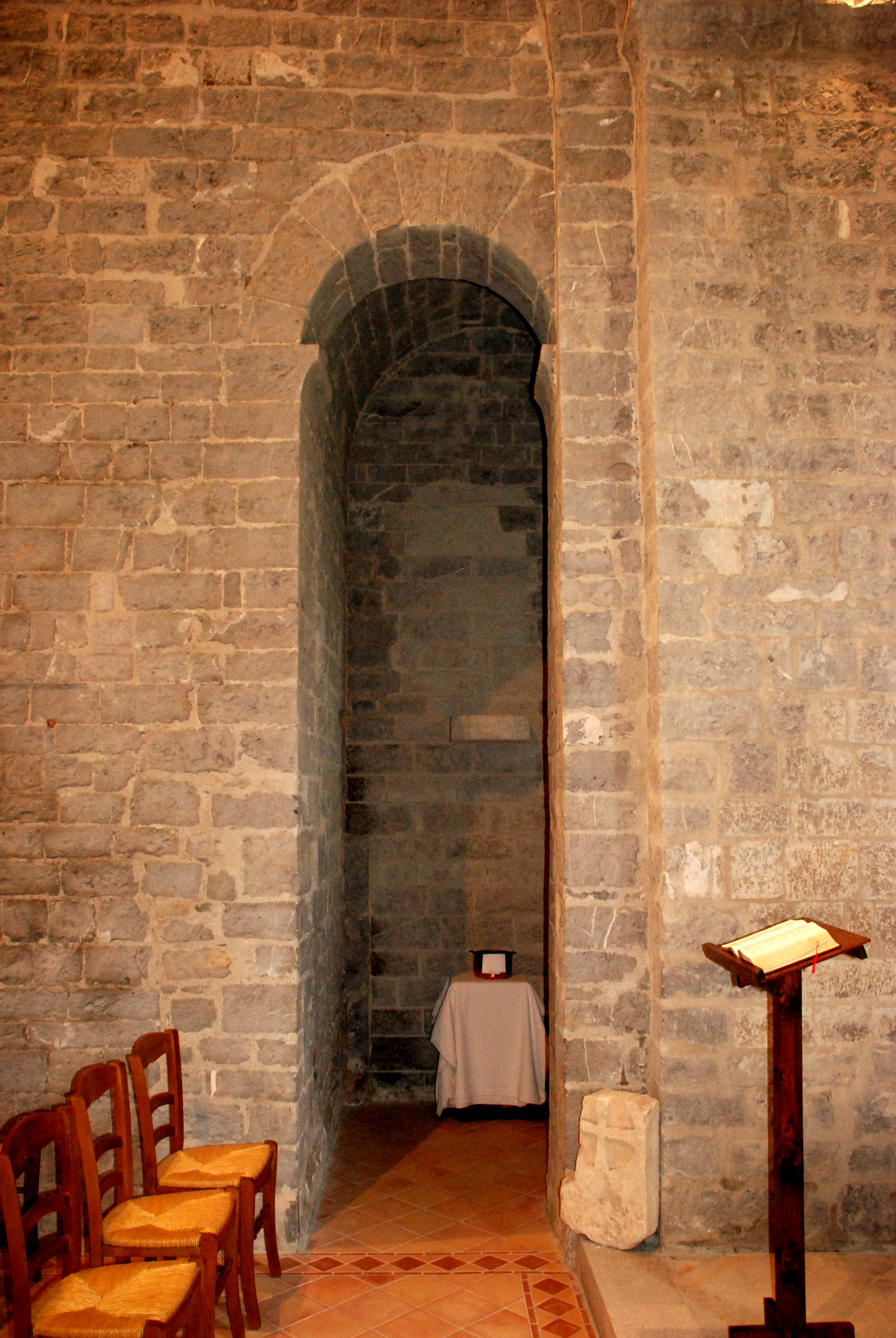 France - Gard - Église Saint-Baudile de Tornac